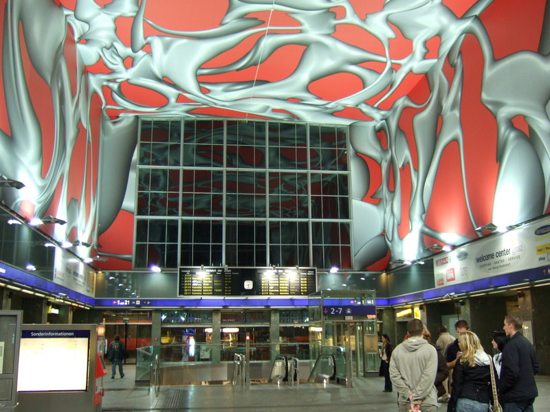 Halle des Grazer Hauptbahnhofes